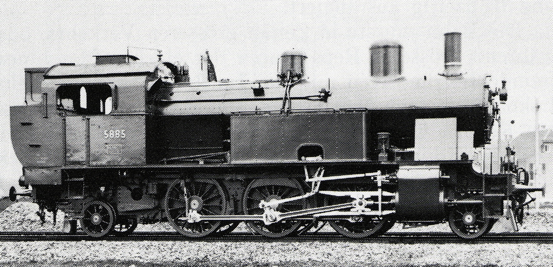 Tender-Lokomotive Eb 3/5 Nr. 5885 der Schweizerischen Bundesbahnen, gebaut 1910 in der Lokomotivfabrik J. A. Maffei München (Fabr.-Nr. 3125) für die Bodensee-Toggenburg-Bahn als Nummer 5, 1911 mit Überhitzer ausgestattet, 1932 an die SBB verkauft, 1964 ausser Dienst gestellt und anschliessend abgebrochen.